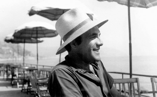 Guido Seborga, Bordighera, anni '50 Autore sconosciuto. Fonte